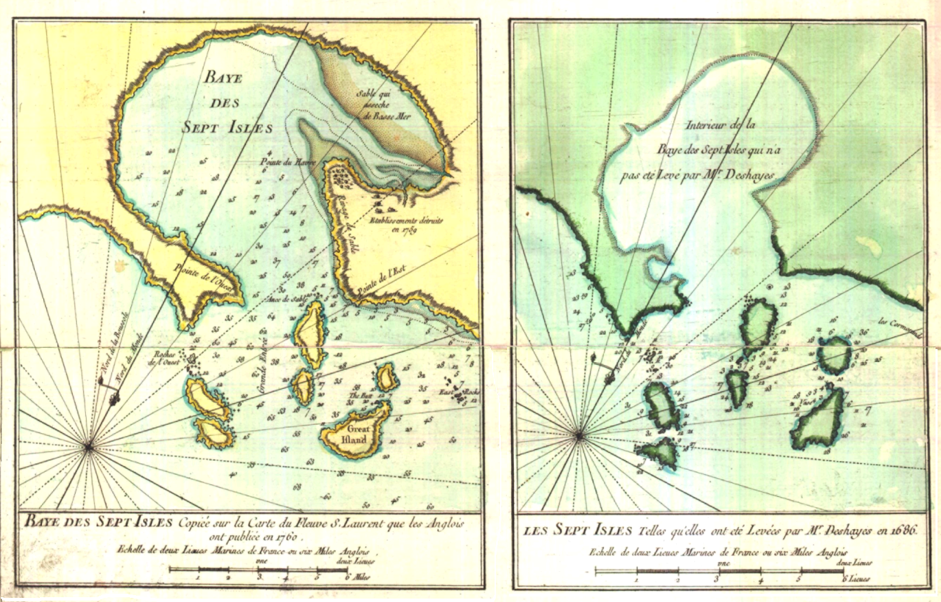 2 cartons extraits de : Carte du cours du fleuve de Saint Laurent depuis la mer jusqu'a Quebec en deux feuilles : IIe feuille - Cartons : "Baye des Sept Isles" ; "Les Sept Isles" ; "Rade et isles du Mingan" ; "Vue des terres entre la pointe des Montspelés et celle de Manicouagan"